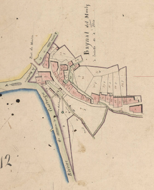 El Veïnat del Molí de Sant Llorenç de Cerdans en el Cadastre napoleònic del 1812 (Arxius Departamentals dels Pirineus Orientals)